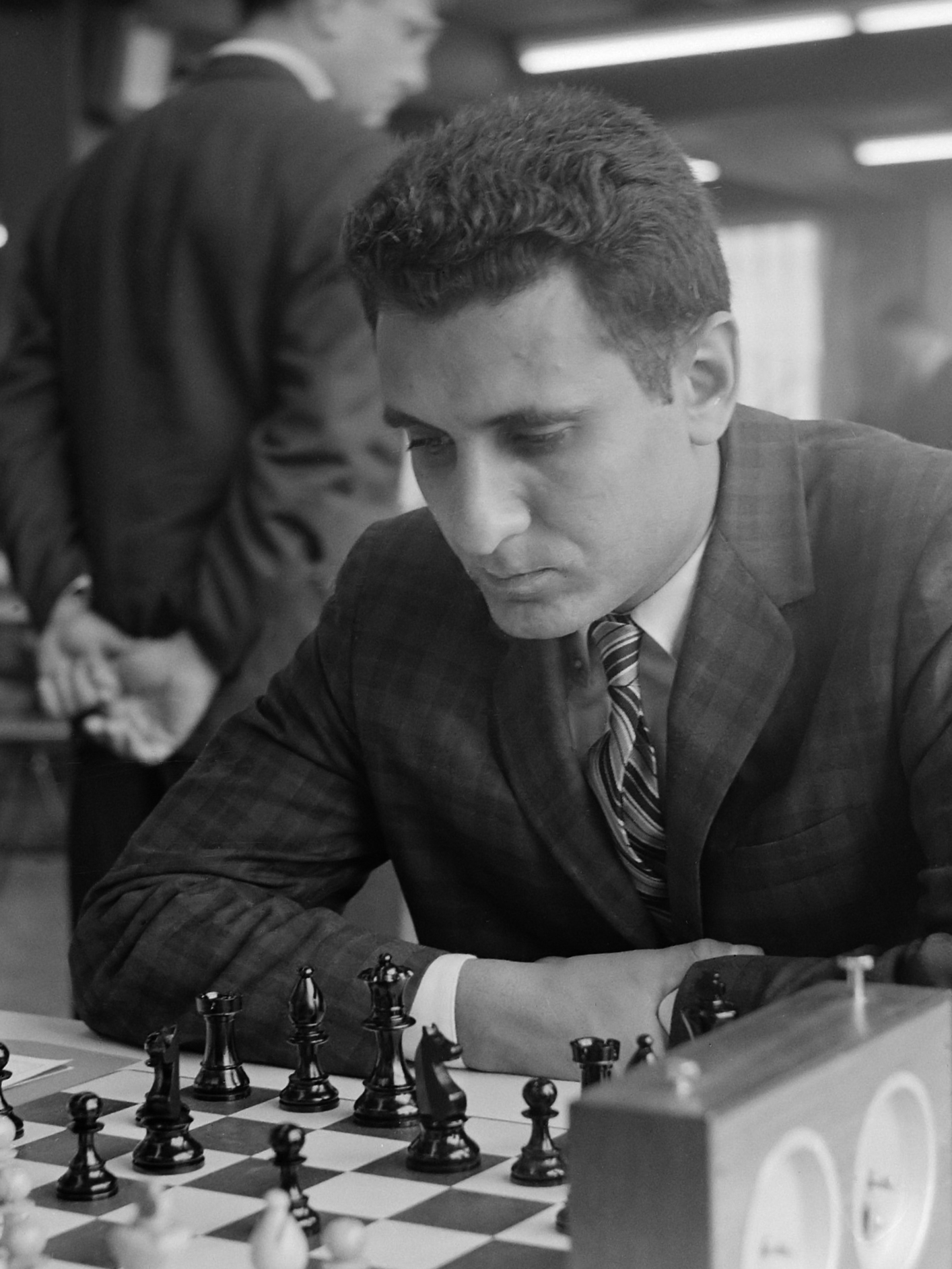 Interfide schaaktoernooi in GAK gebouw, Larry Evans 21 mei 1964